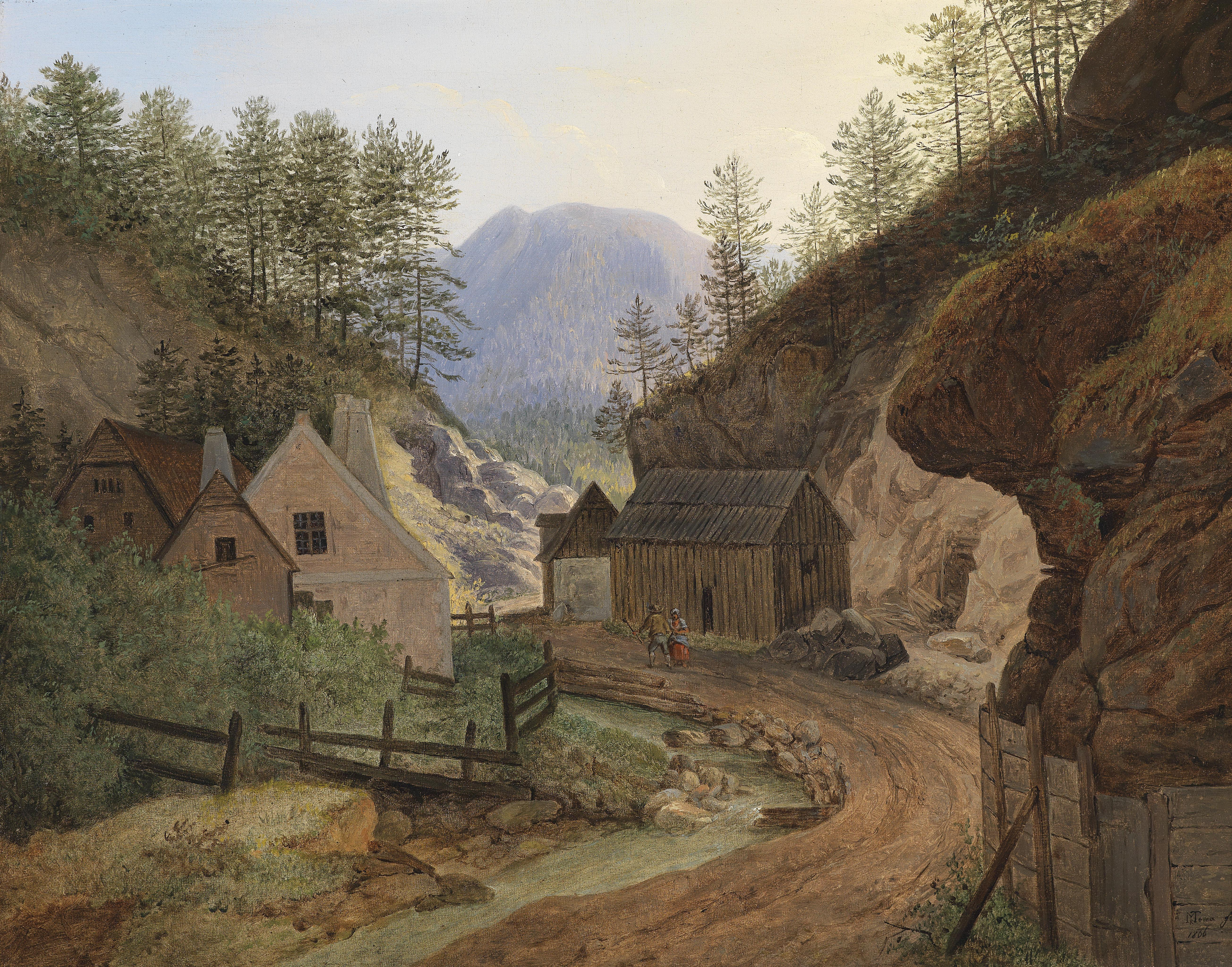 Mühle bei Schottwienlabel QS:Lde,"Mühle bei Schottwien"